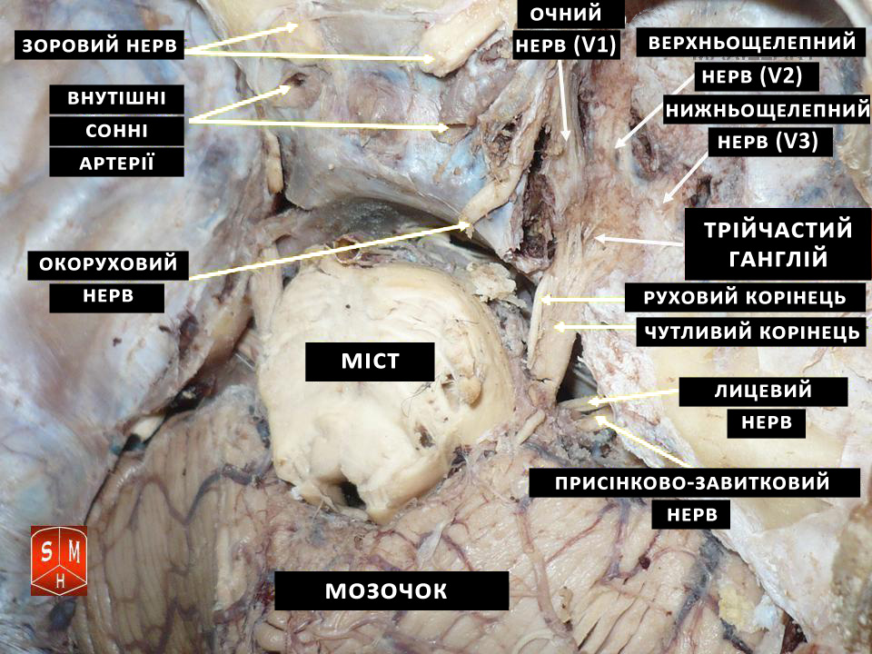 Трійчастий ганглій